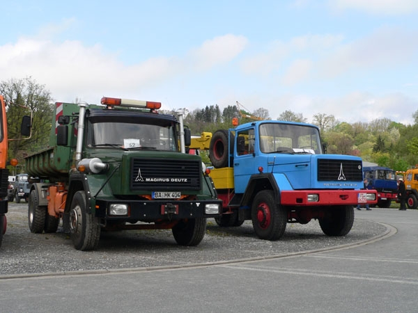 Магирусы образца 1971 года на ежегодной встрече любителей Магирусов в Нойштатде на Айше